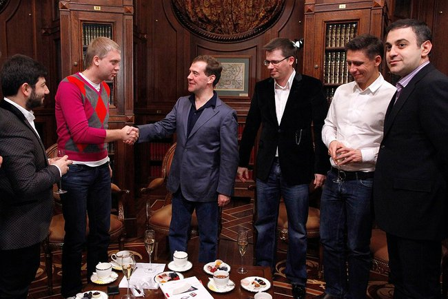 Встреча с участниками Comedy club